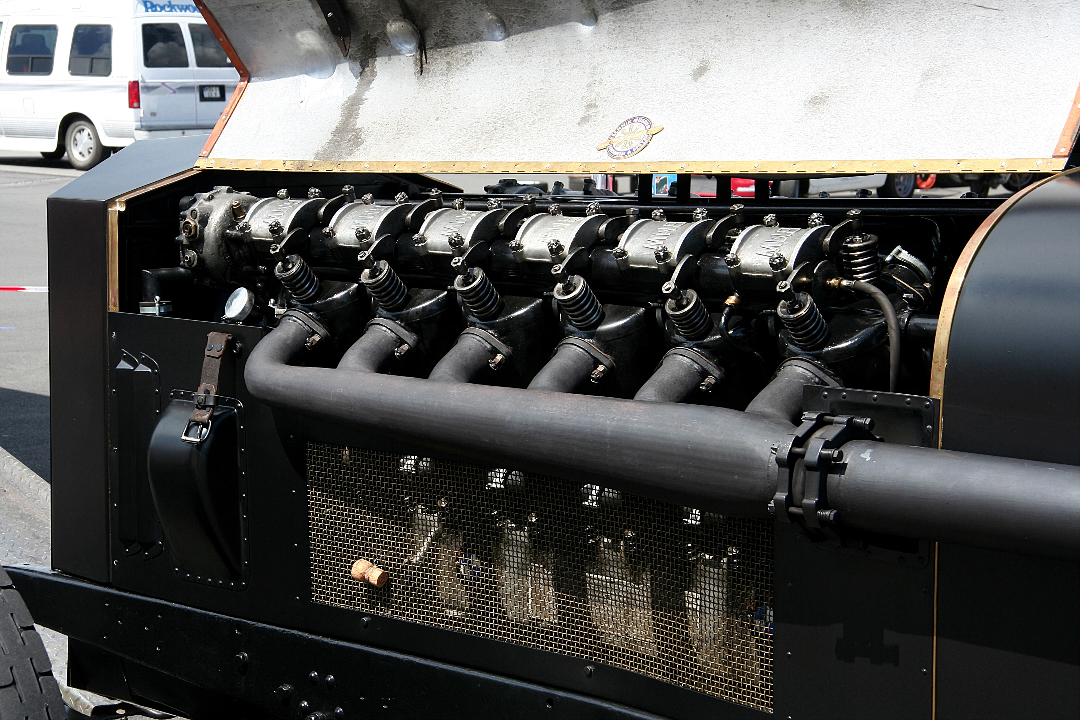 Brutus – Experimentalfahrzeug des Technikmuseums Sinsheim